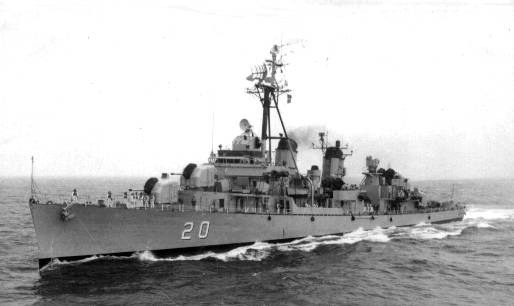 ARA_Almirante_Brown_D20_underway.